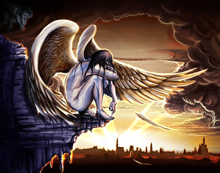 Description: Dessin d'un ange retouché avec Photoshop à partir d'un dessin (Image version aquarelle) Source: Gritche Licence